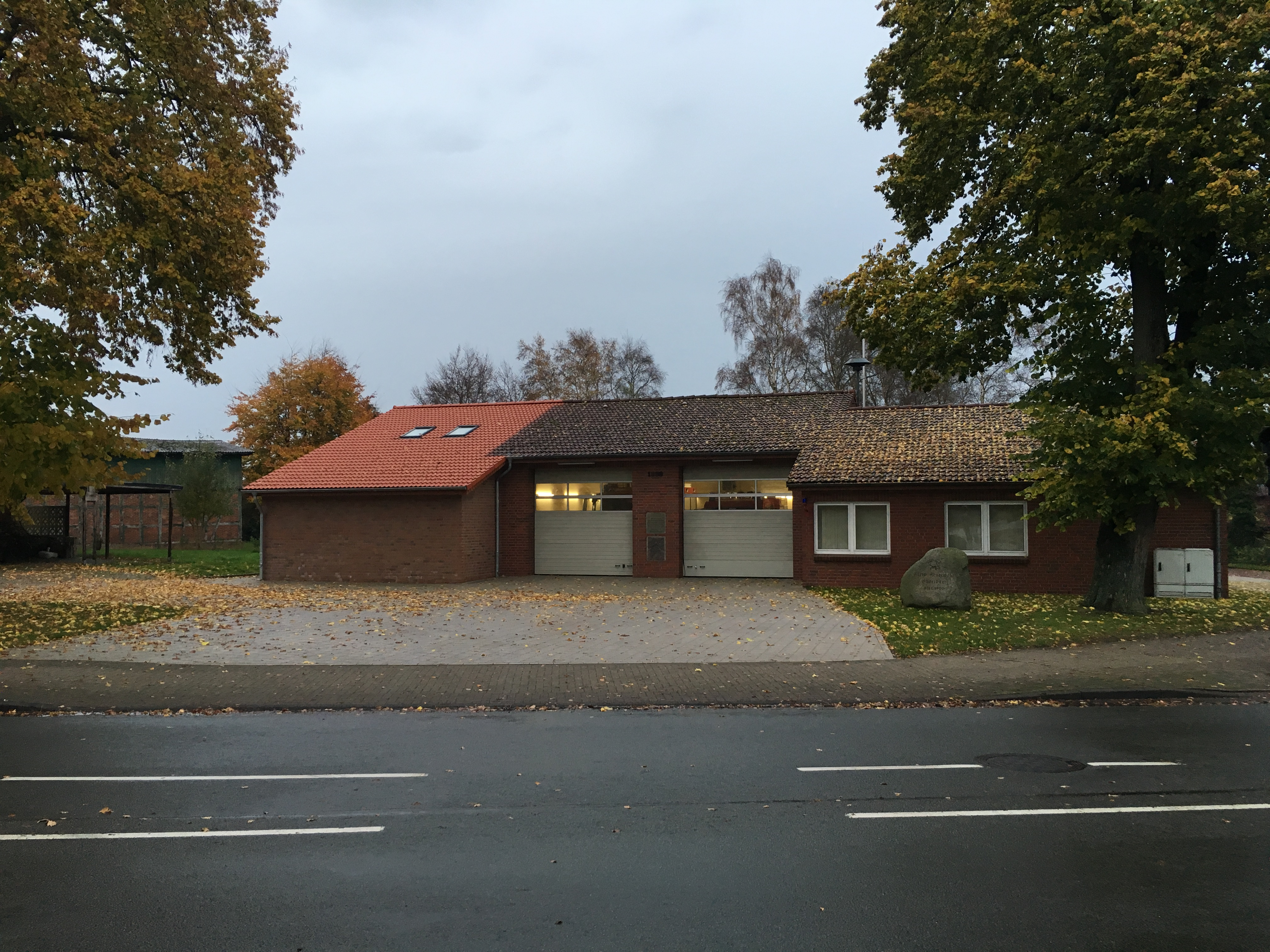 Sprüttenhuus in Eversdörp, Landkreis Rodenborg